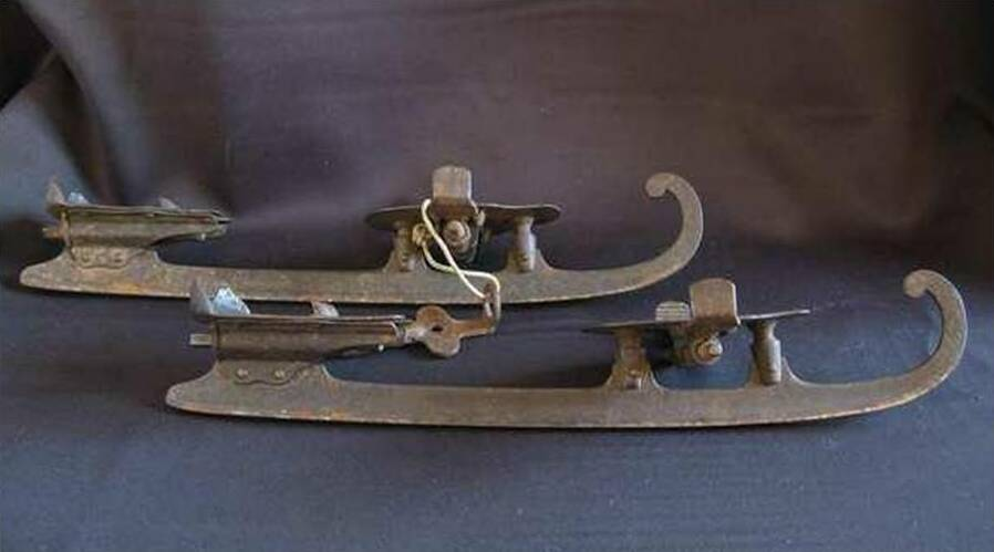 Klemschaatsen of sleutelschaatsen en: Klemskates or keyskates